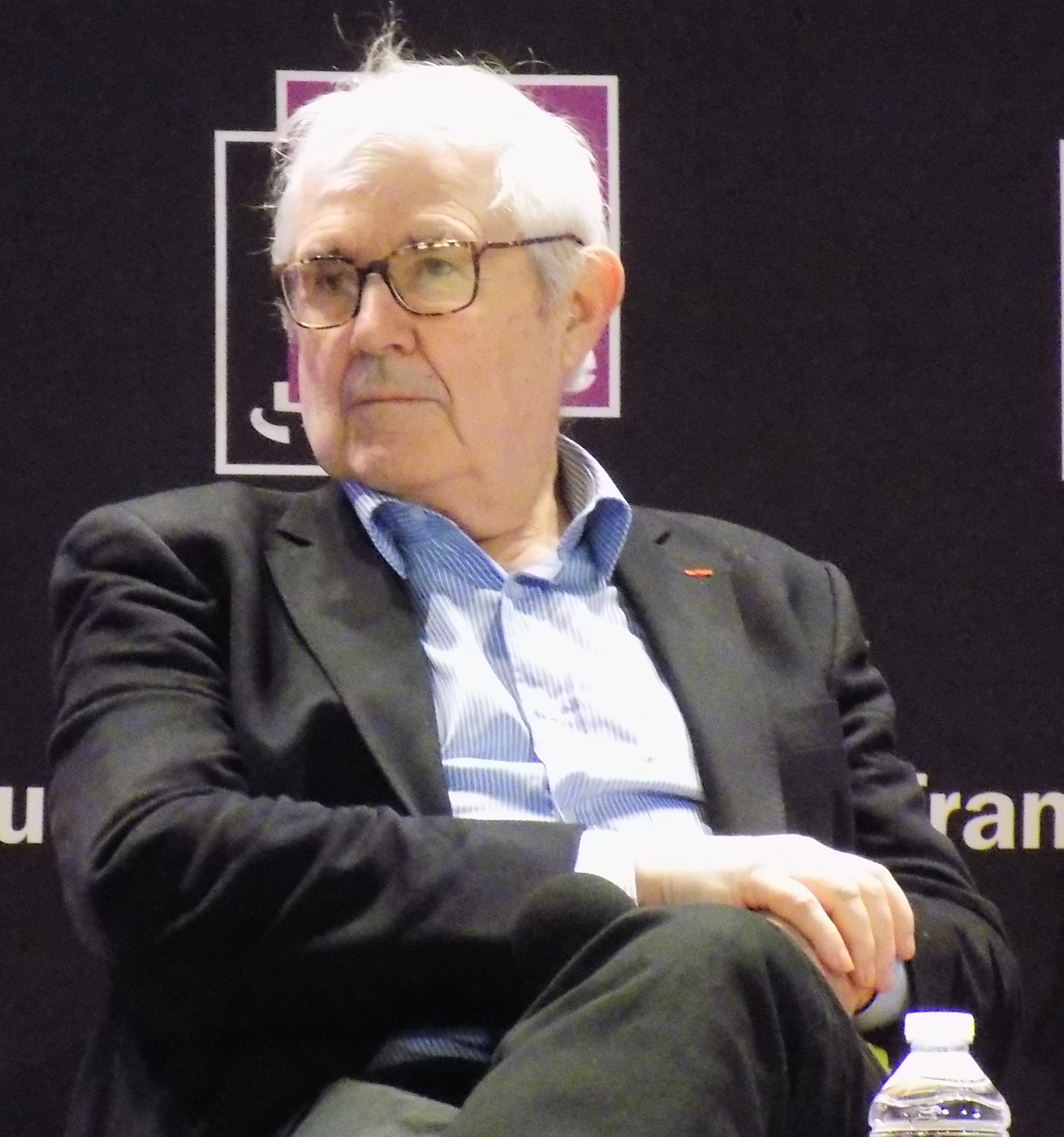 Hervé Le Bras lors du forum « L’année vue par les sciences » organisé par France Culture le 13 février 2016